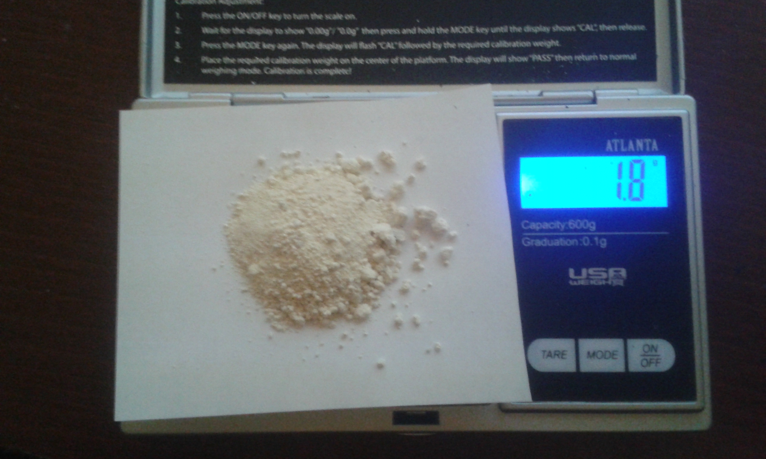 pile of AB-FUBINACA on weight scale